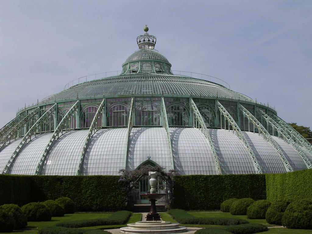 Royal Greenhouse of Laeken in Brussels, BelgiumLaken